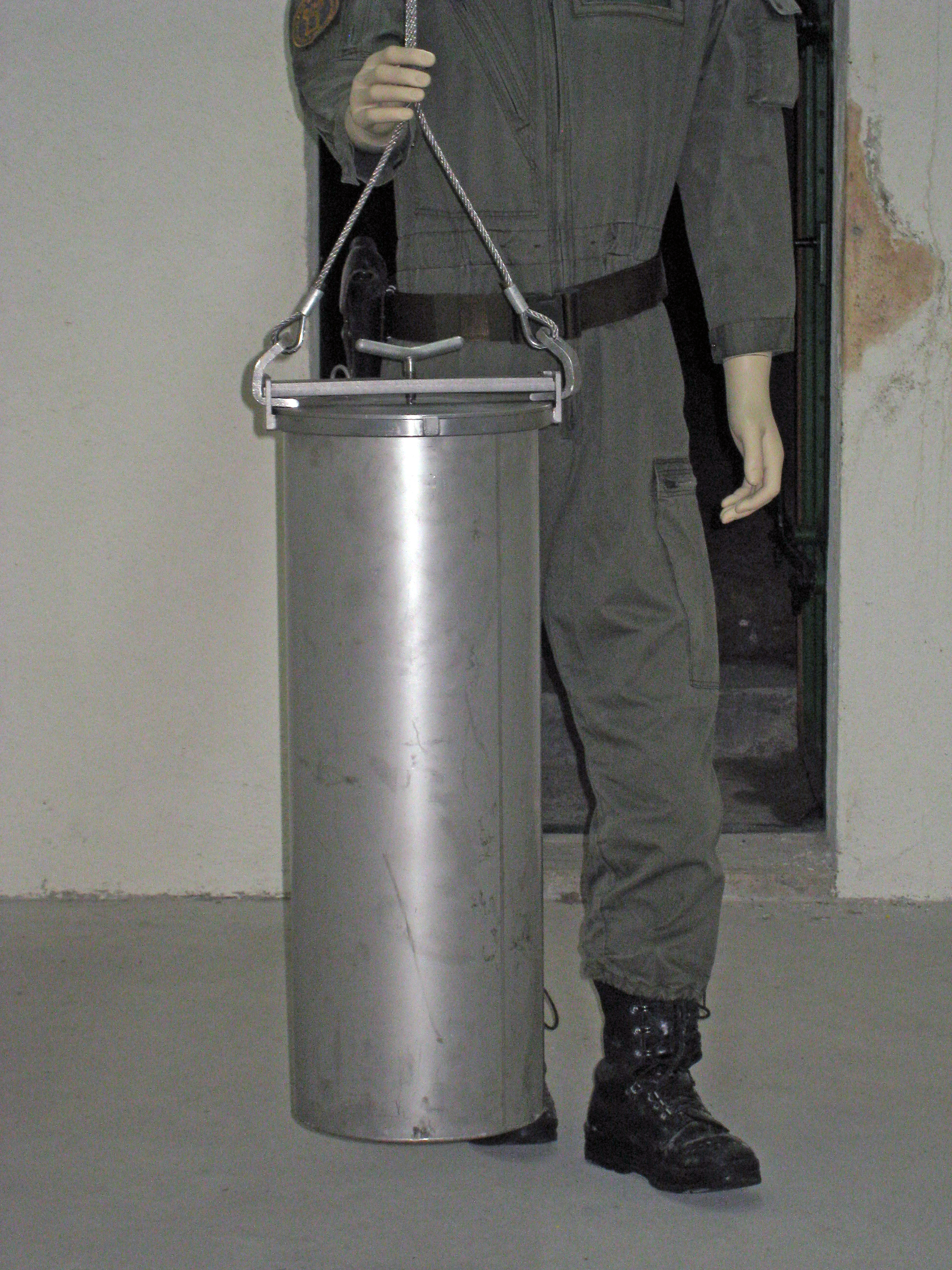 Container der P-26